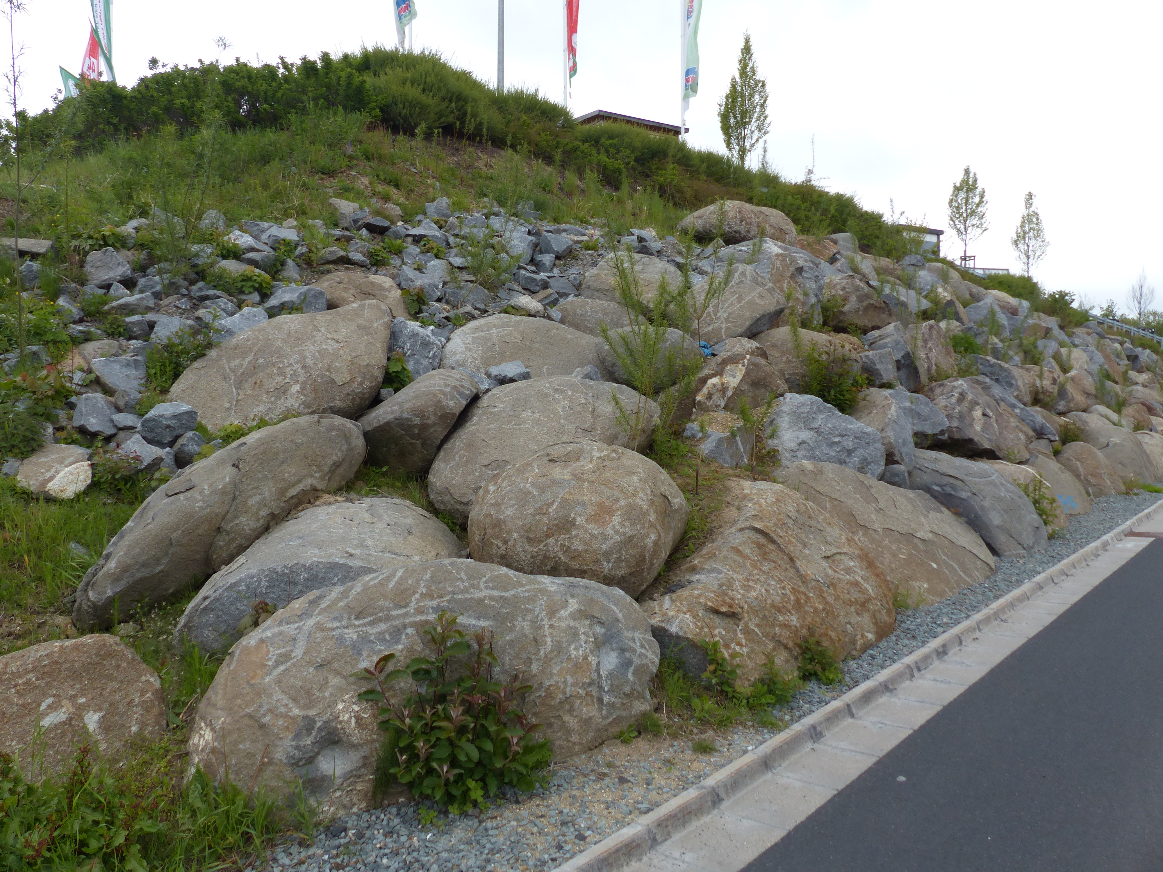 Redwitzit-Aufschluss E von Marktredwitz